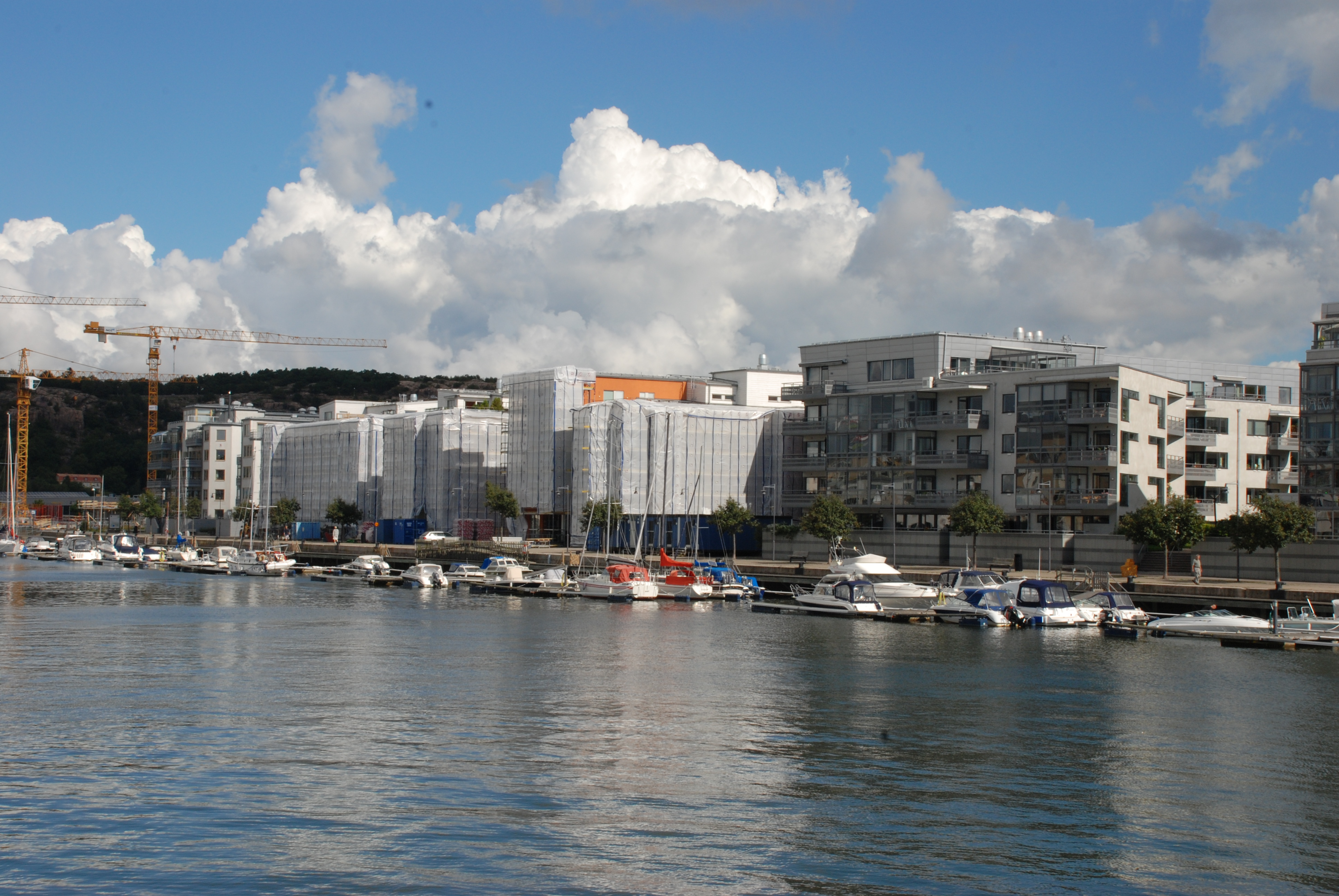 Sannegårdshamnen i stadsdelarna Sannegården och Lindholmen på Hisingen i Göteborg. På bilden syns Lindholmssidan från Sannegården.